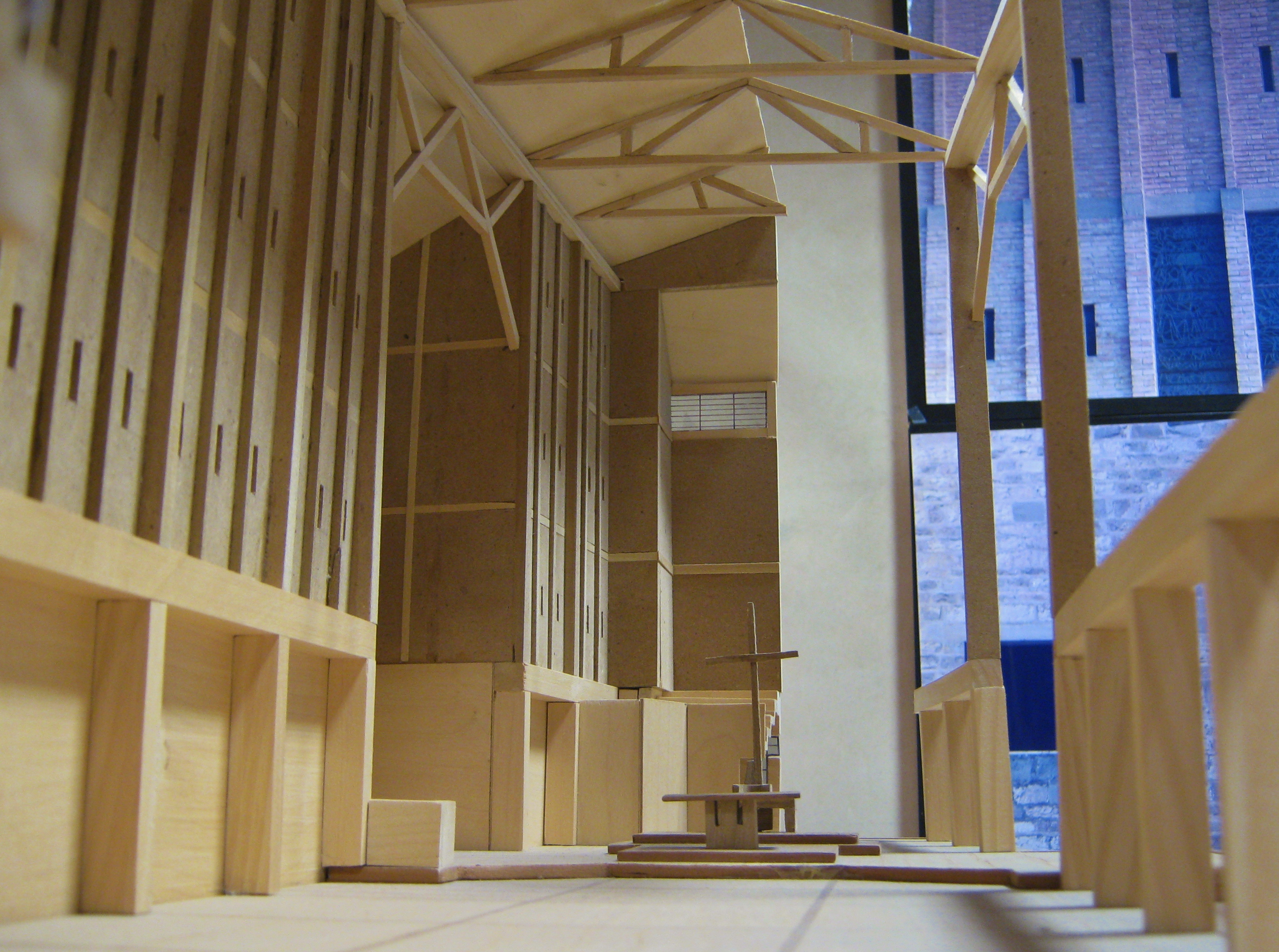 Pistoia, Museo Civico (Palazzo Comunale): modello della chiesa delle Ss. Maria e Tecla, in Pistoia.